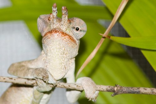 Bradypodion tavetanum, männlich, Ansicht der Hörner